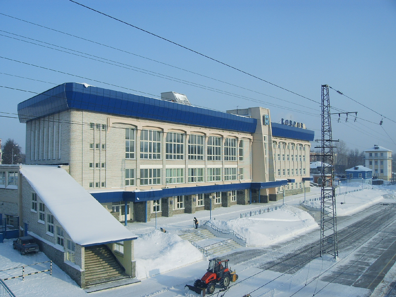 Der Bahnhof von Kowrow. Kowrow Ковров.